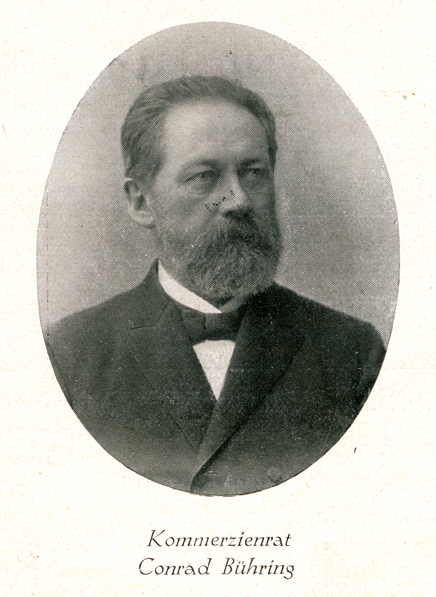 Punktgerasterter Abdruck einer mutmaßlich in den 1890er Jahren angefertigten Fotografie des Seidenwaren-Großhändlers und Bürgervorsteher-Worthalters und Kommerzienrates Conrad Bühring ...